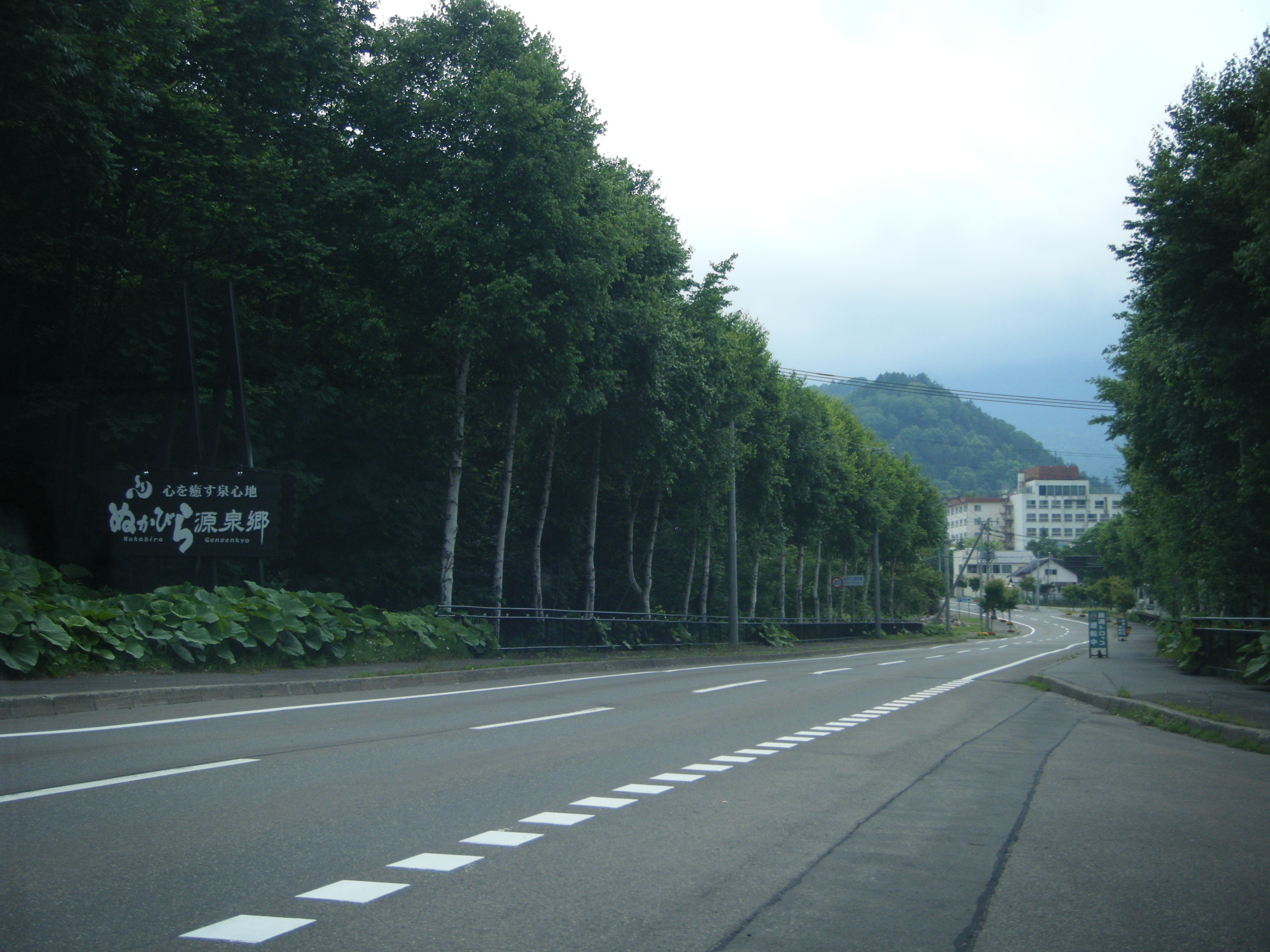 ぬかびら温泉郷入口。三国峠側より撮影。